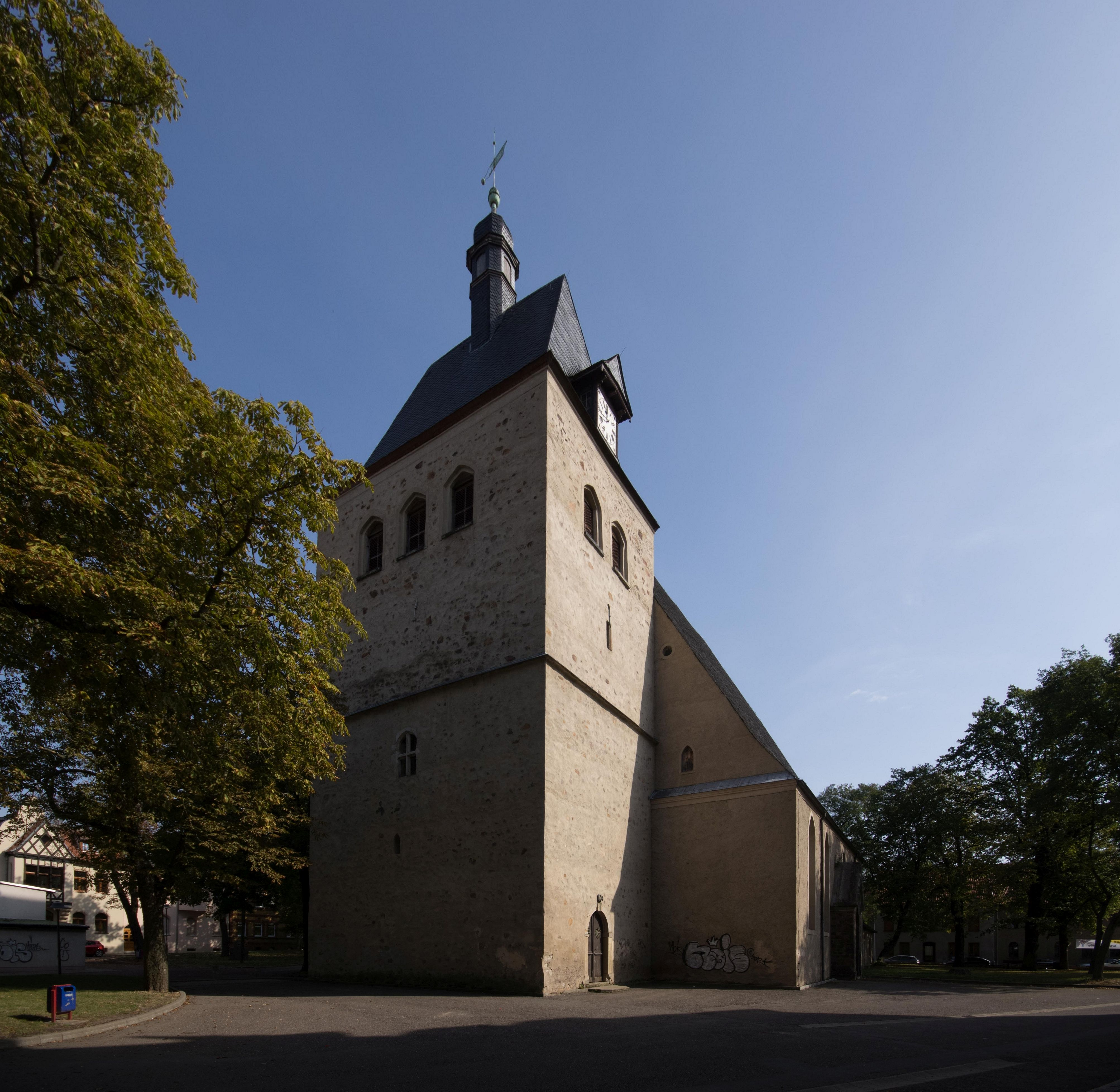 Zörbig in Sachsen-Anhalt. Die Kirche steht unter Denkmalschutz.